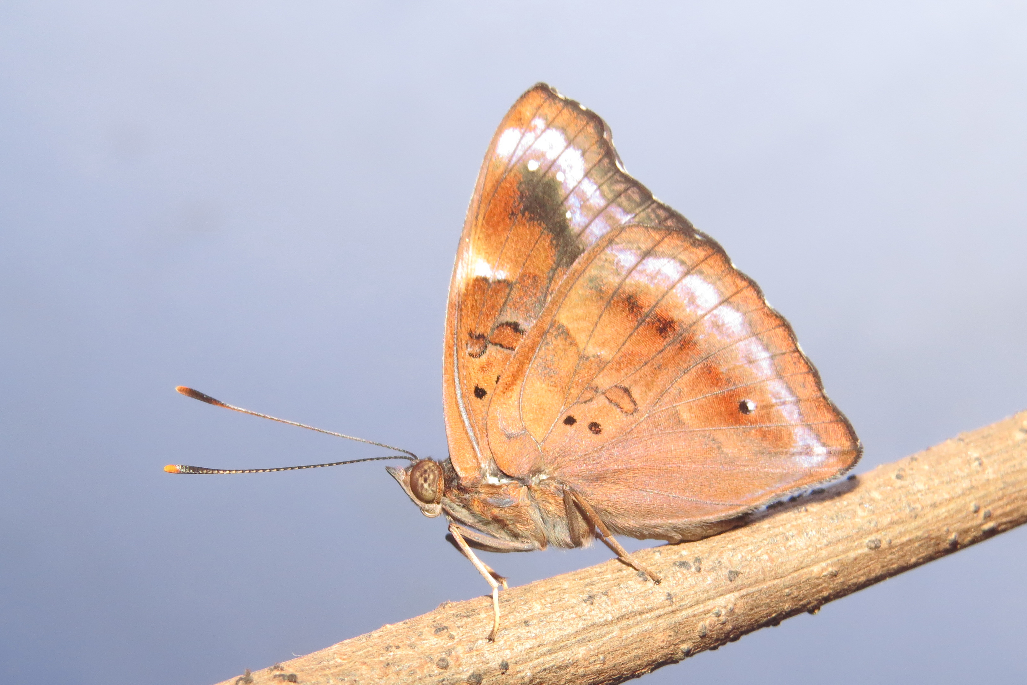 Rohana parisatis Westwood, 1850 – Black Prince at Periya, Wayanad